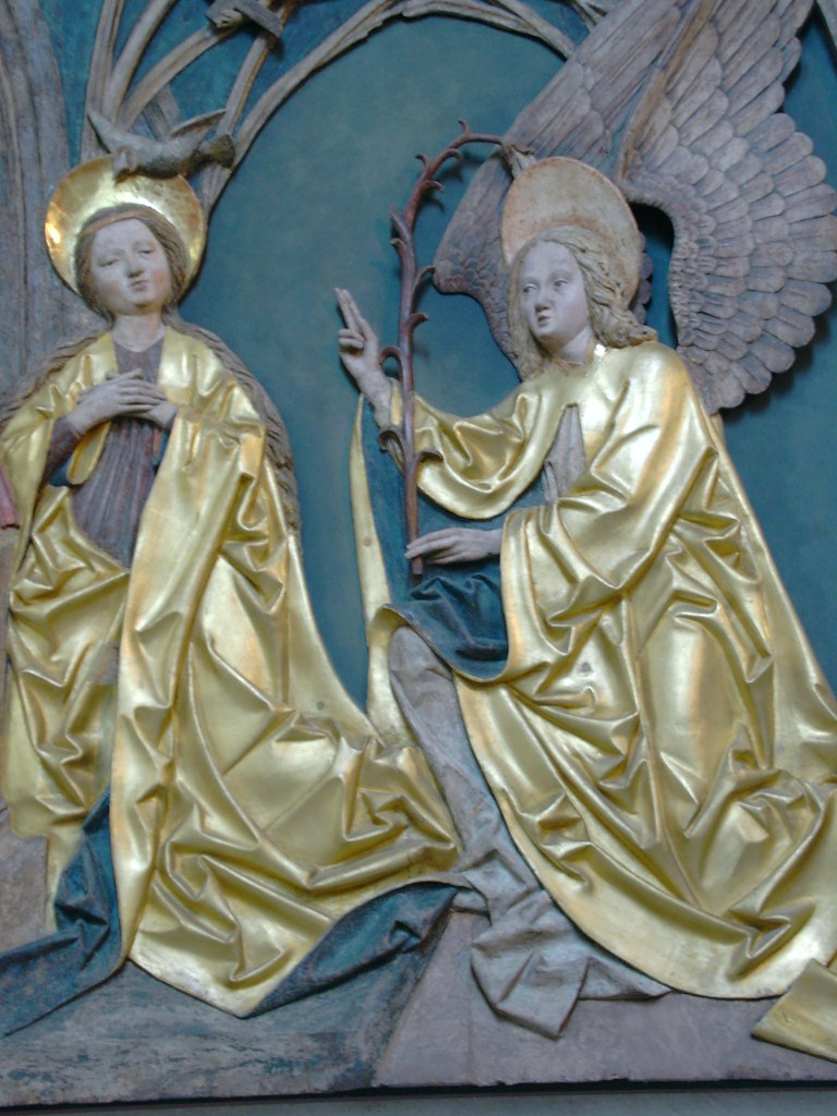 Schreinflügel